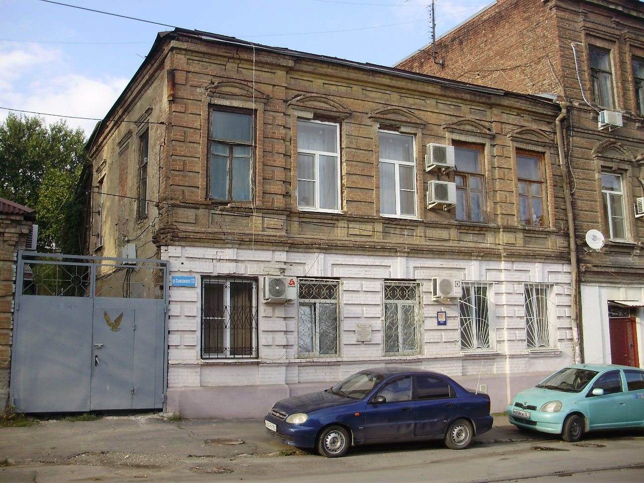 Дом в Ростове-на-Дону, где жила М.П. Черская (ул. Станиславского, 133)